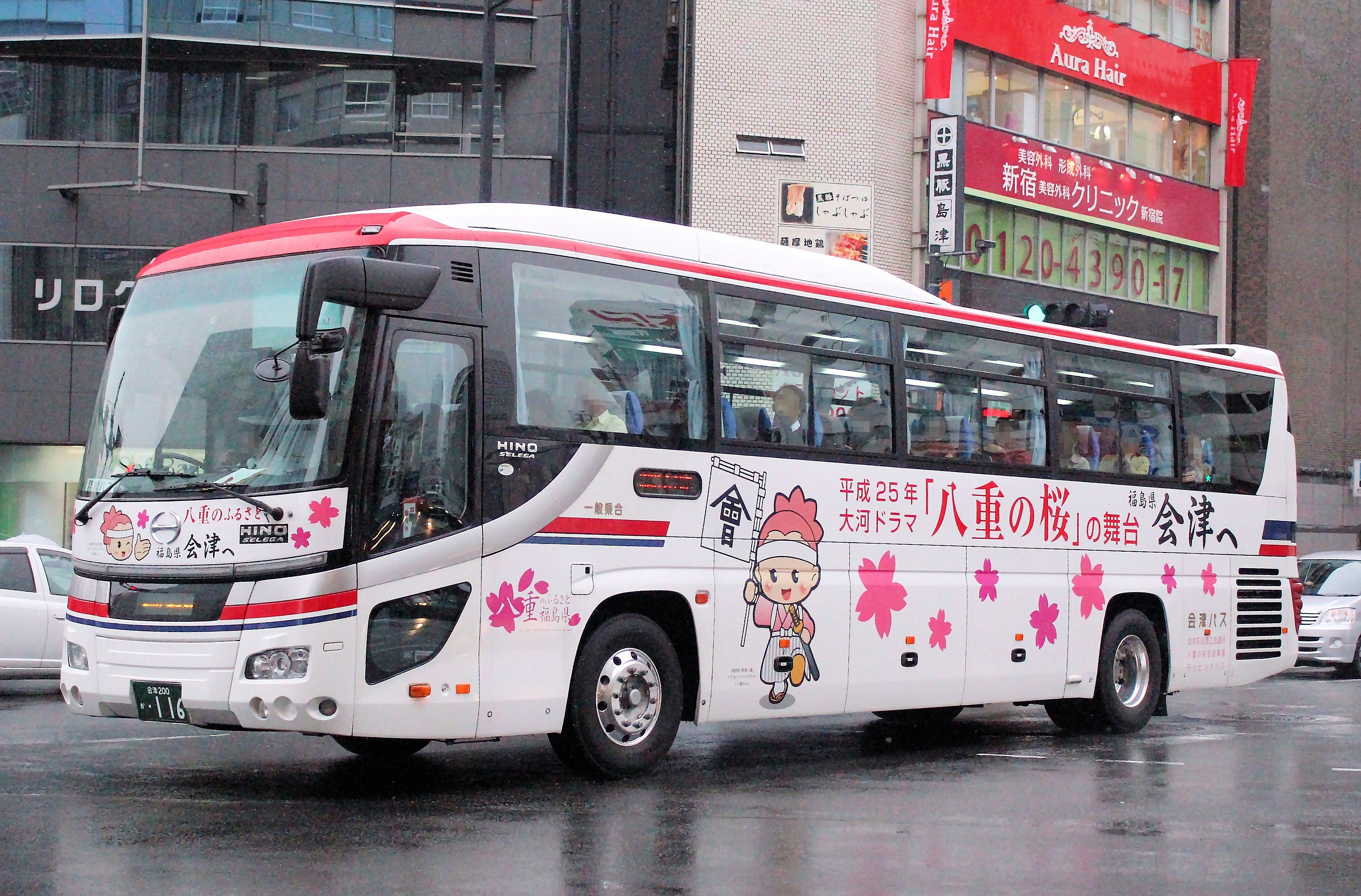 夢街道会津号/会津乗合自動車（会津バス）/会津200か116/日野セレガ/大河ドラマ「八重の桜」ラッピング仕様